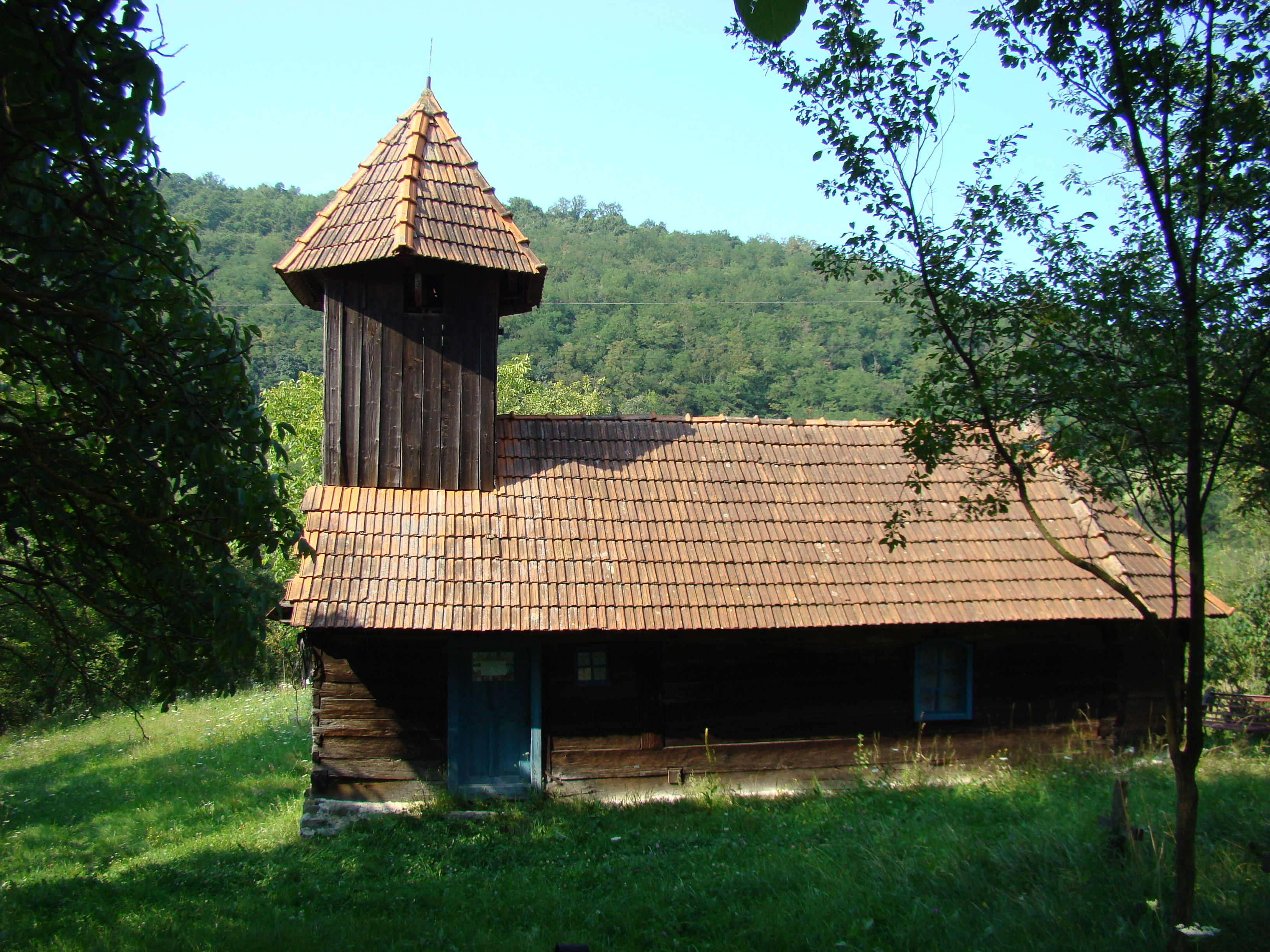 Biserica de lemn „Cuvioasa Paraschiva” Stâncești